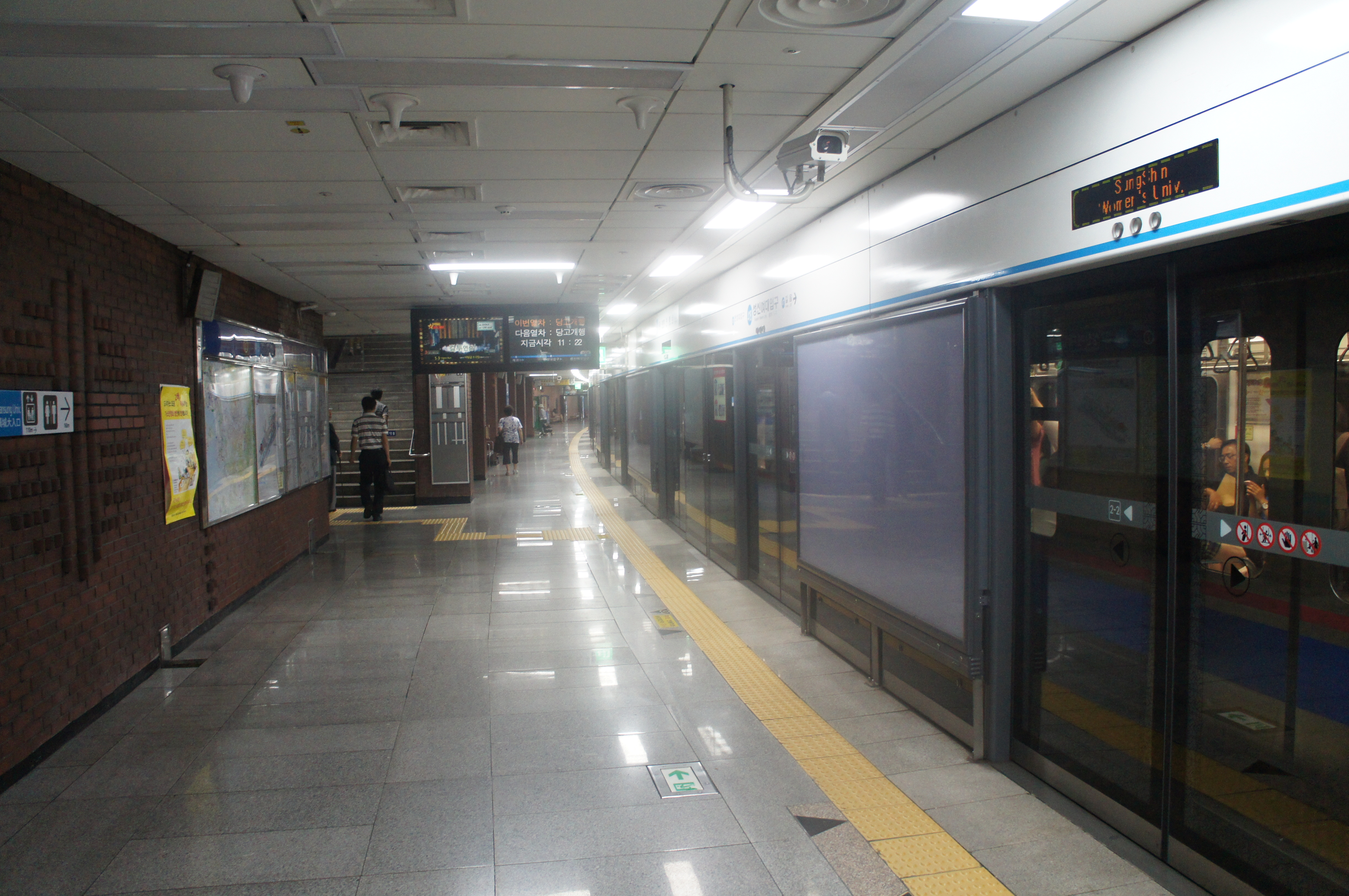 성신여대입구역 승강장